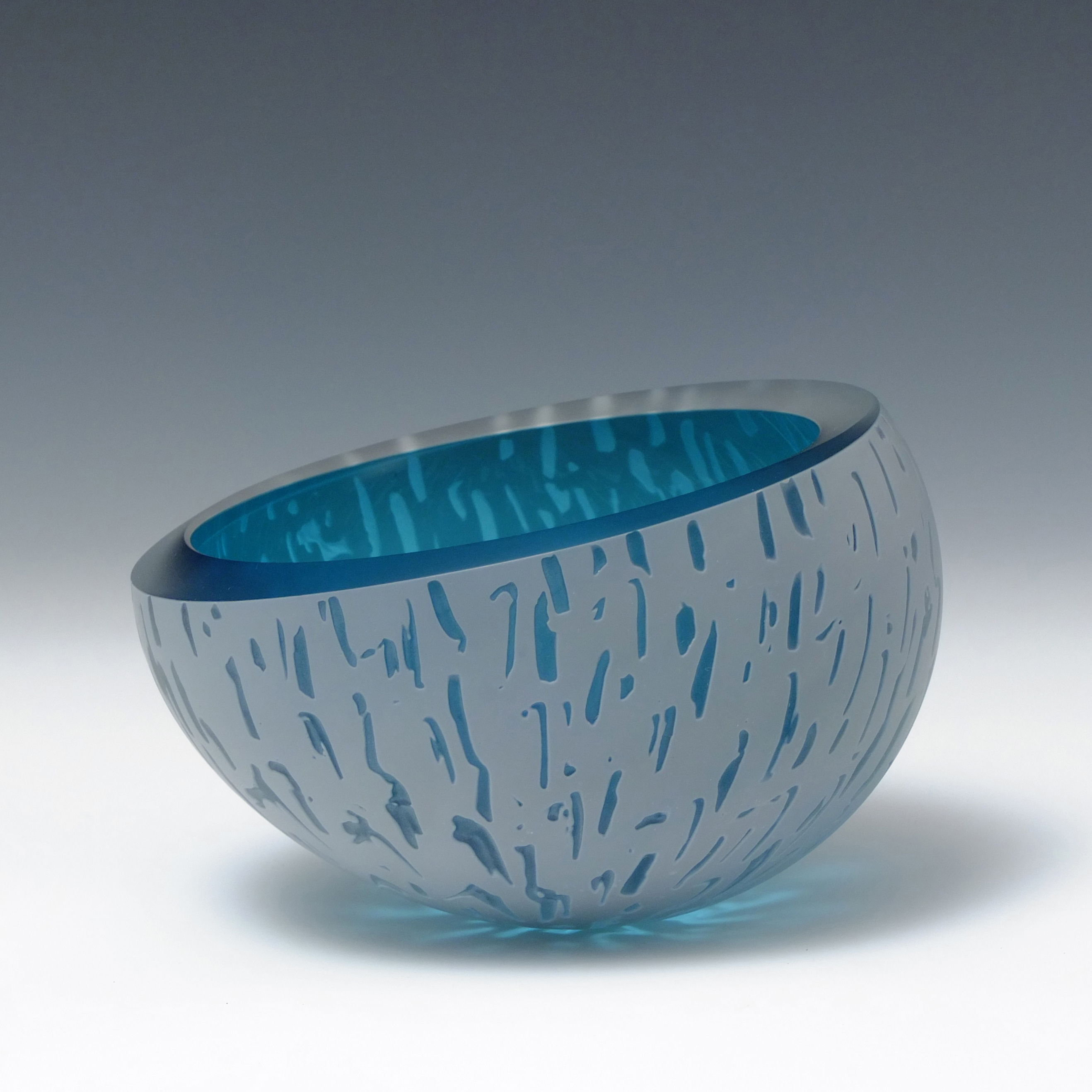 Frei geblasenes Glasgefäß, 1989